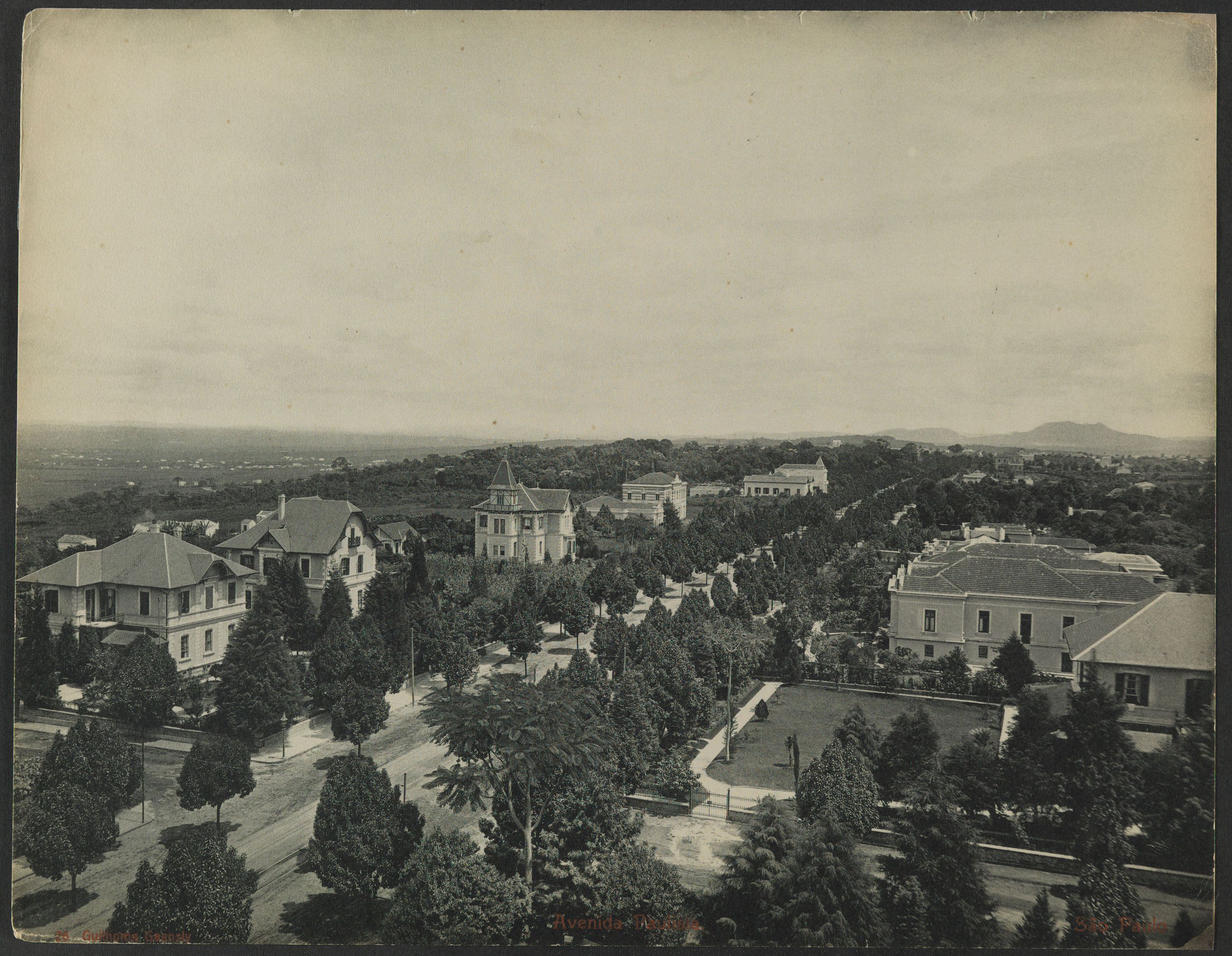 Cartão postal da Avenida Paulista vista da residência de Adam Von Bülow em 1902. São Paulo - Brasil.